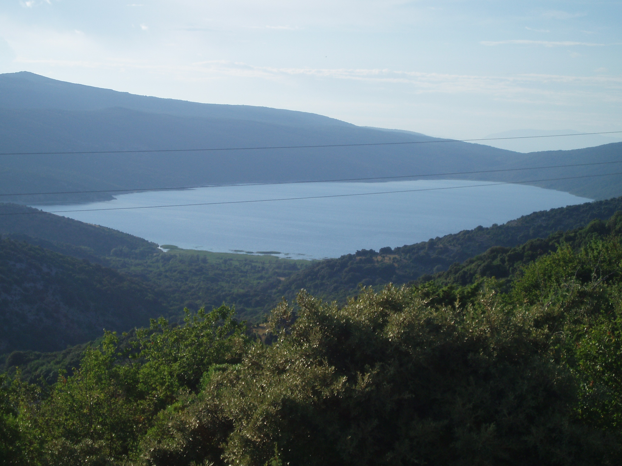 Vransko jezero na otoku Cresu je kriptodepresija i ujedno najveci je rezervoar pitke vode u Hrvatskoj.